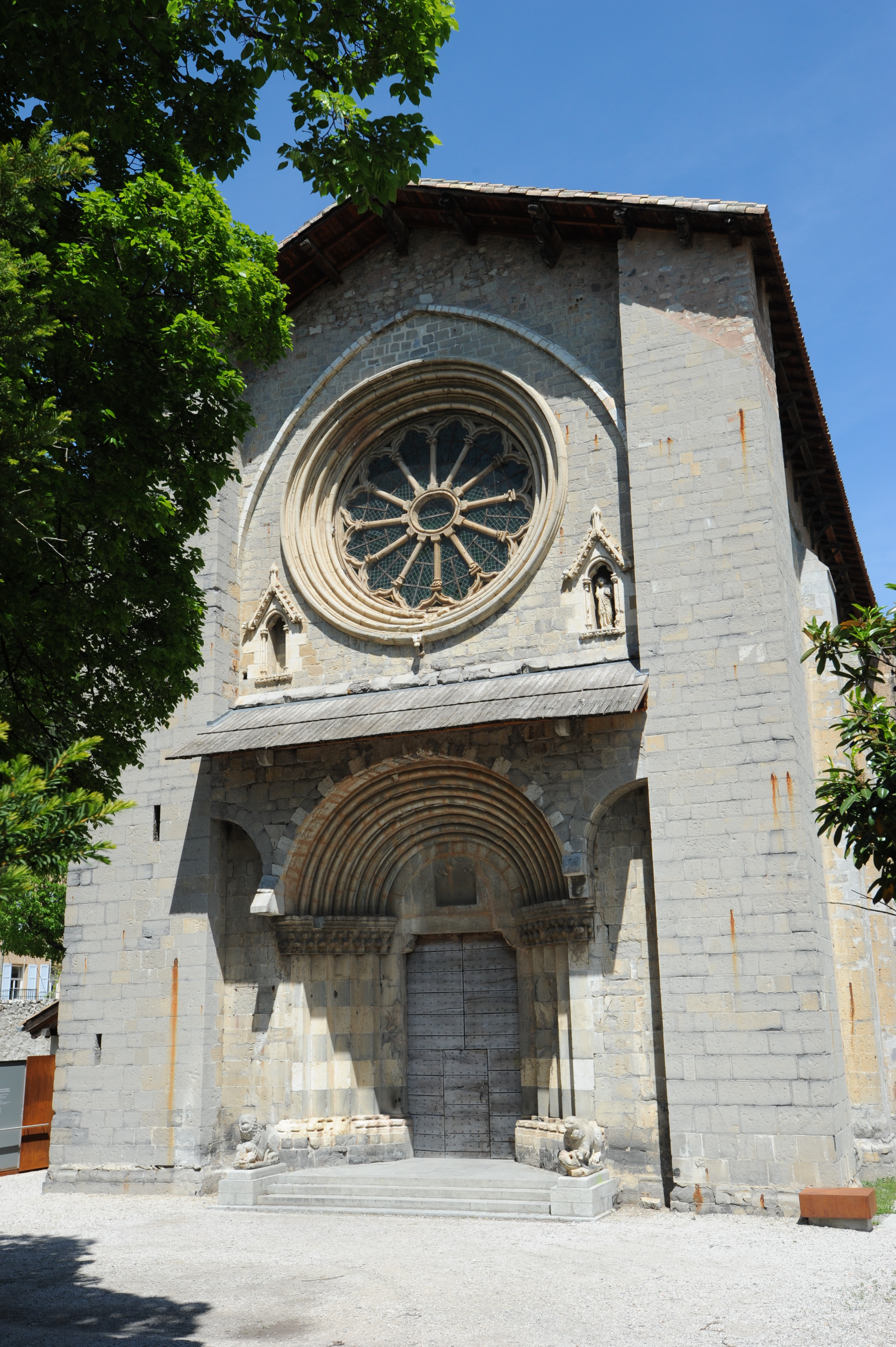 façade de la Cathédrale Notre Dame du Bourg à Digne-les-Bains. Alpes de Haute-Provence .